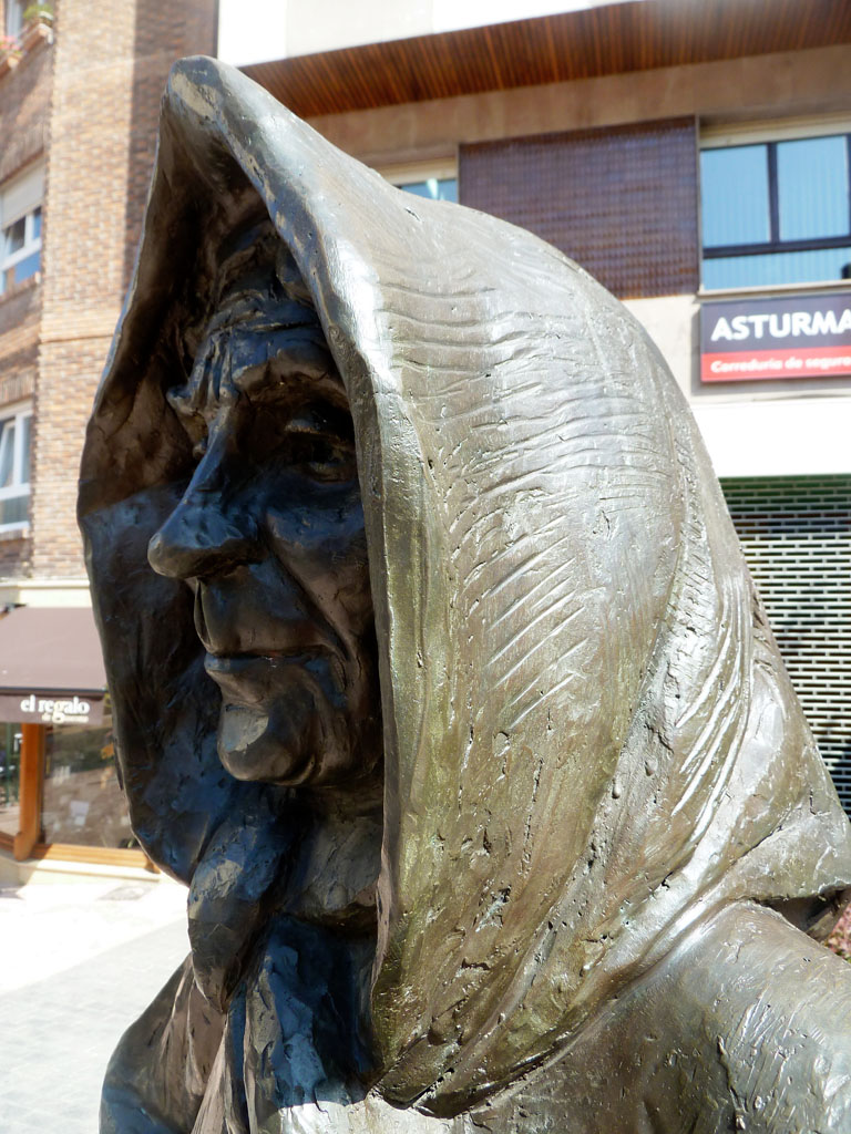 Autor.- Sebastián Miranda